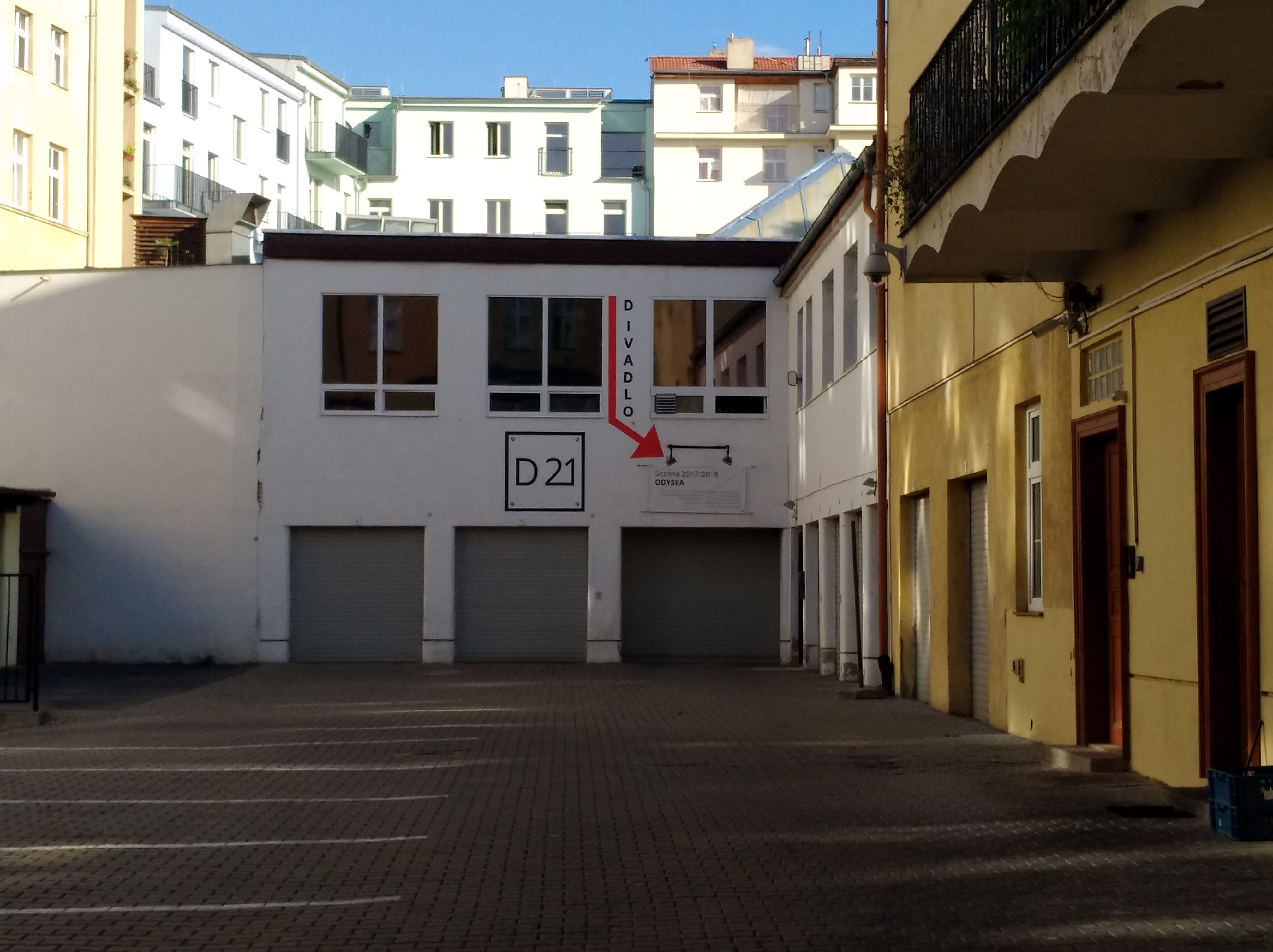 Divadlo D21